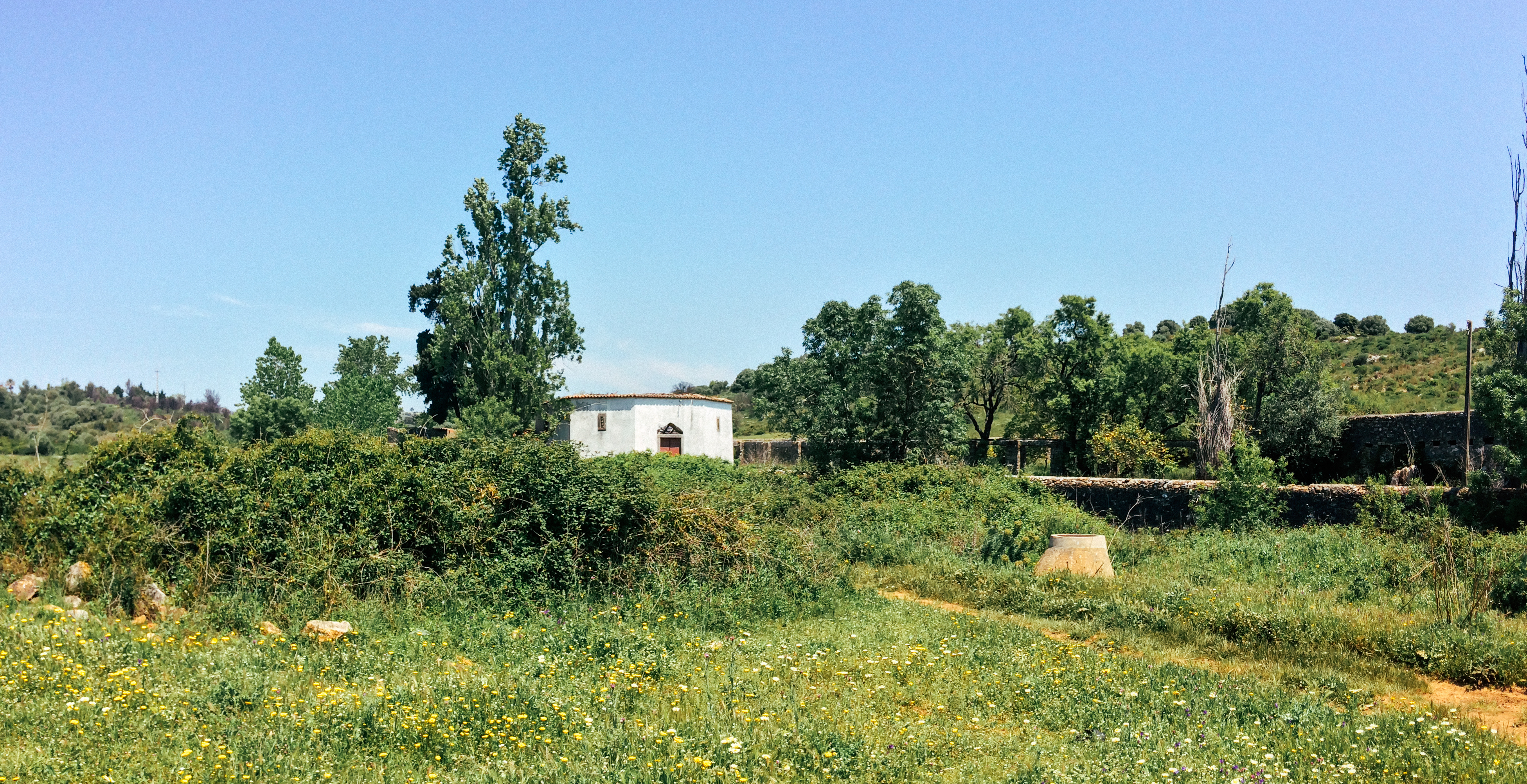 Edifício em ruínas na margem direita da ribeira